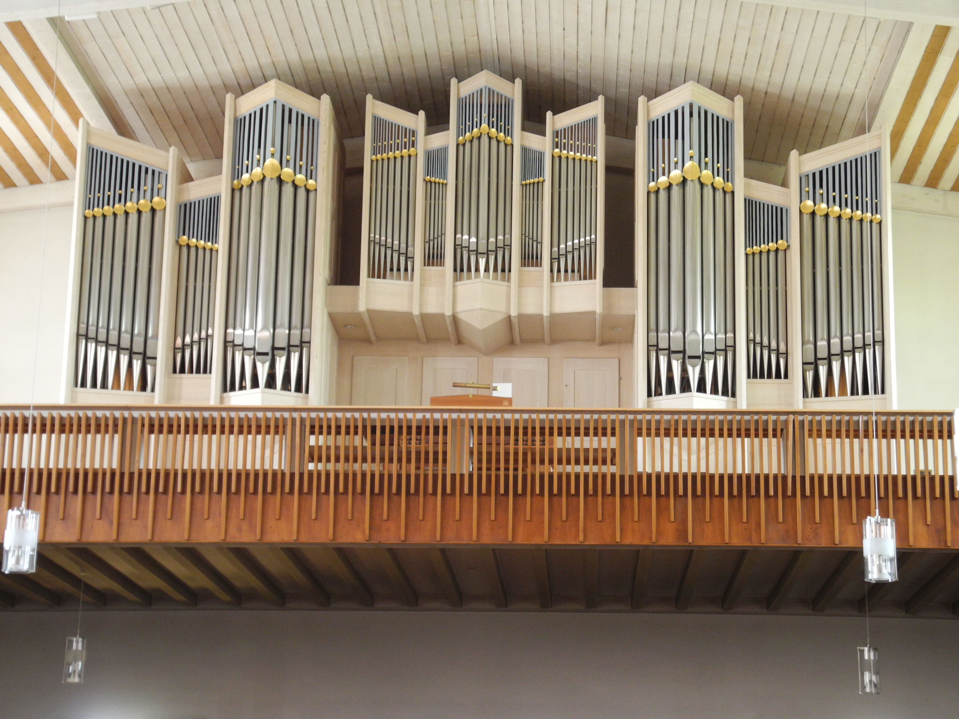 Sandtner op. 206 von 1992 (32/II/P)